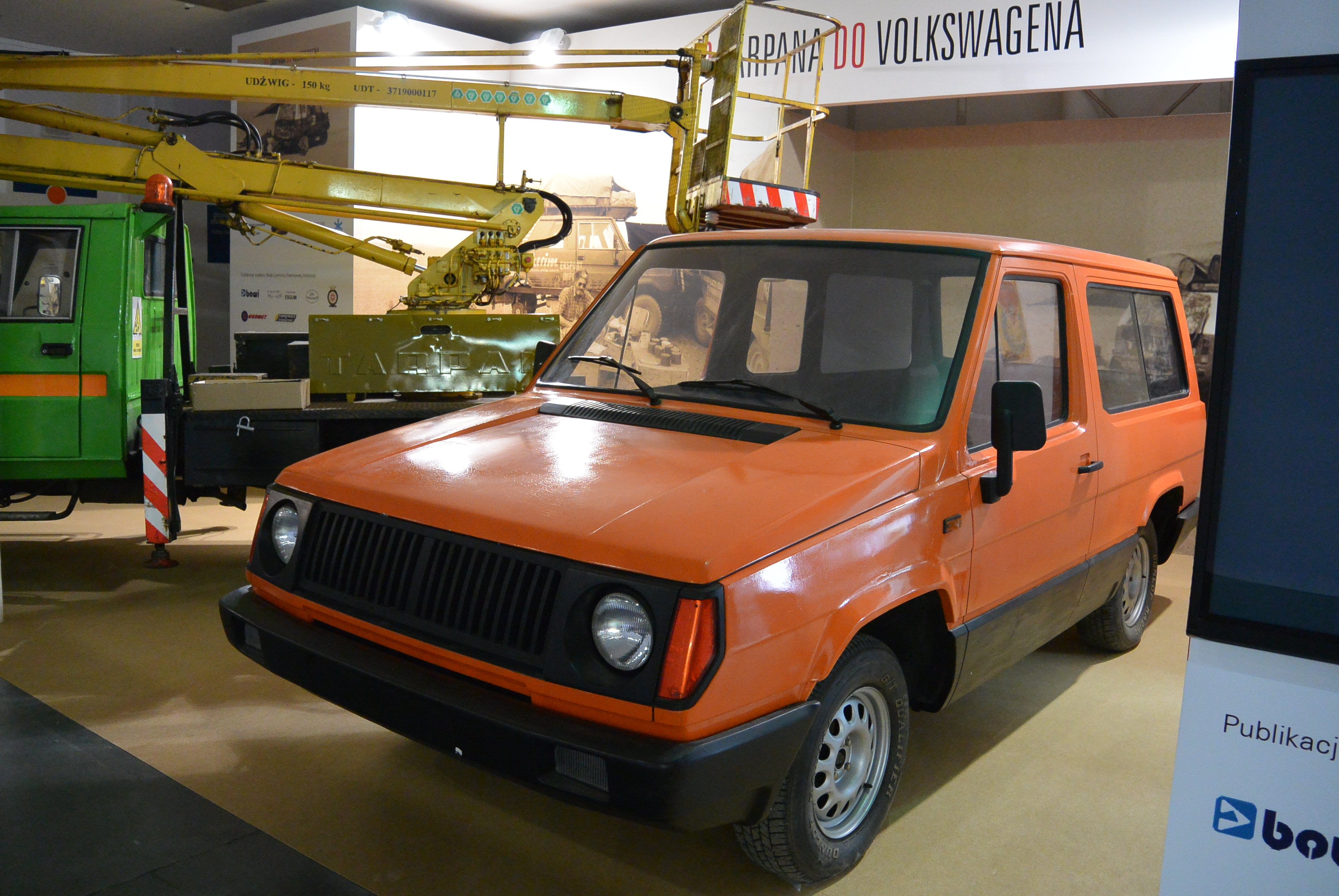 Drewniany prototyp Tarpana podczas Motor Show Poznań 2014.